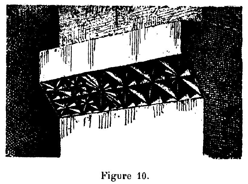 Le Donjon de Courmenant, ses origines, ses seigneurs et possesseurs, son musée